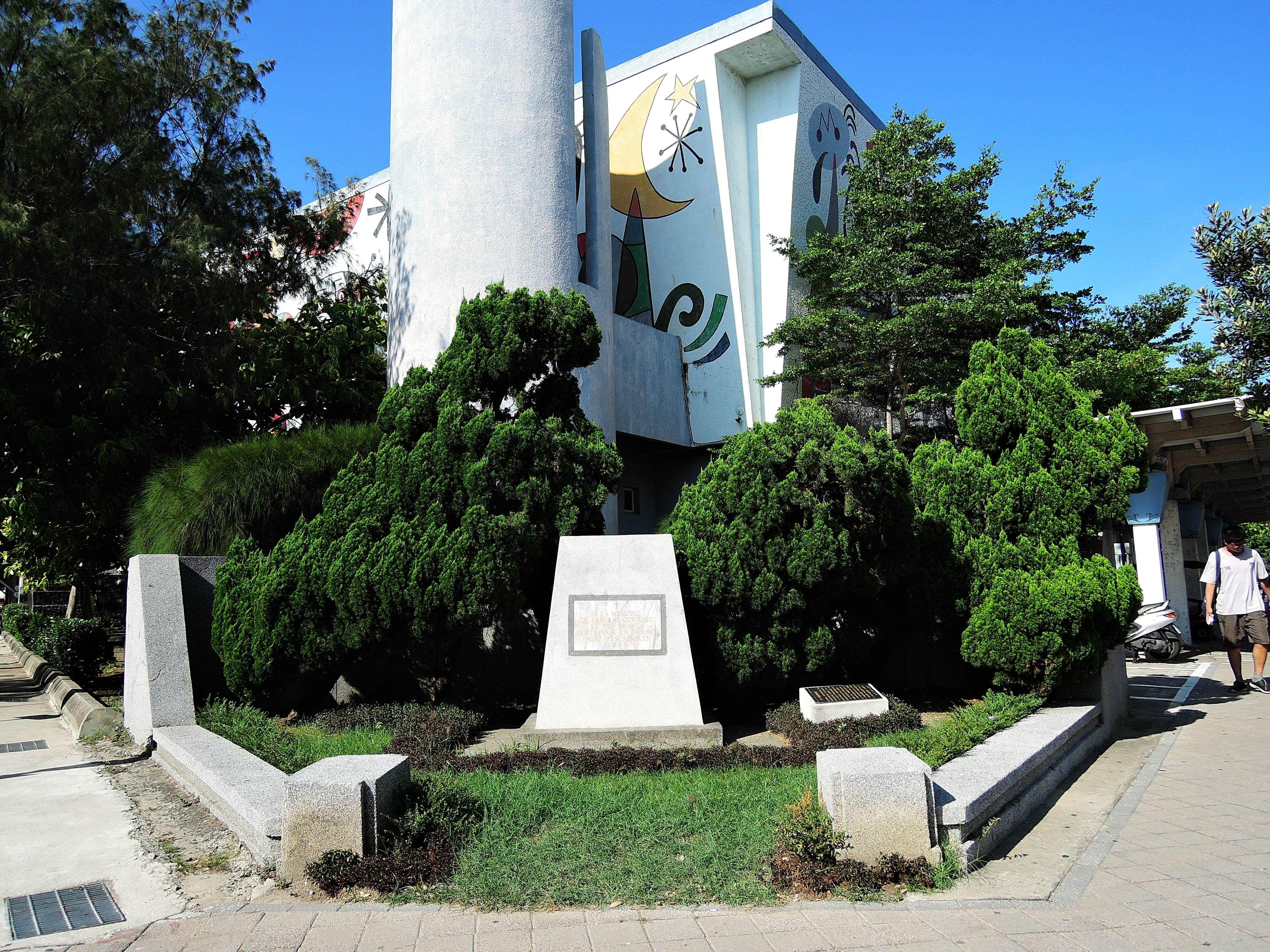 中文（台灣）: 孤拔衣冠塚